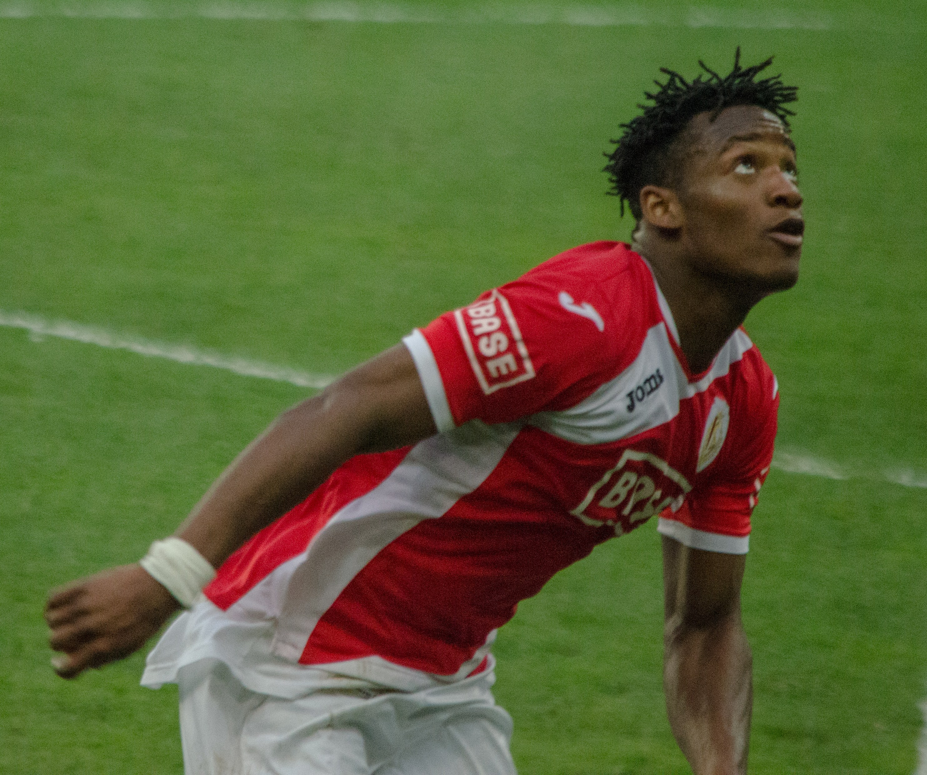 Michy Batshuayi avec le Standard de Liège.